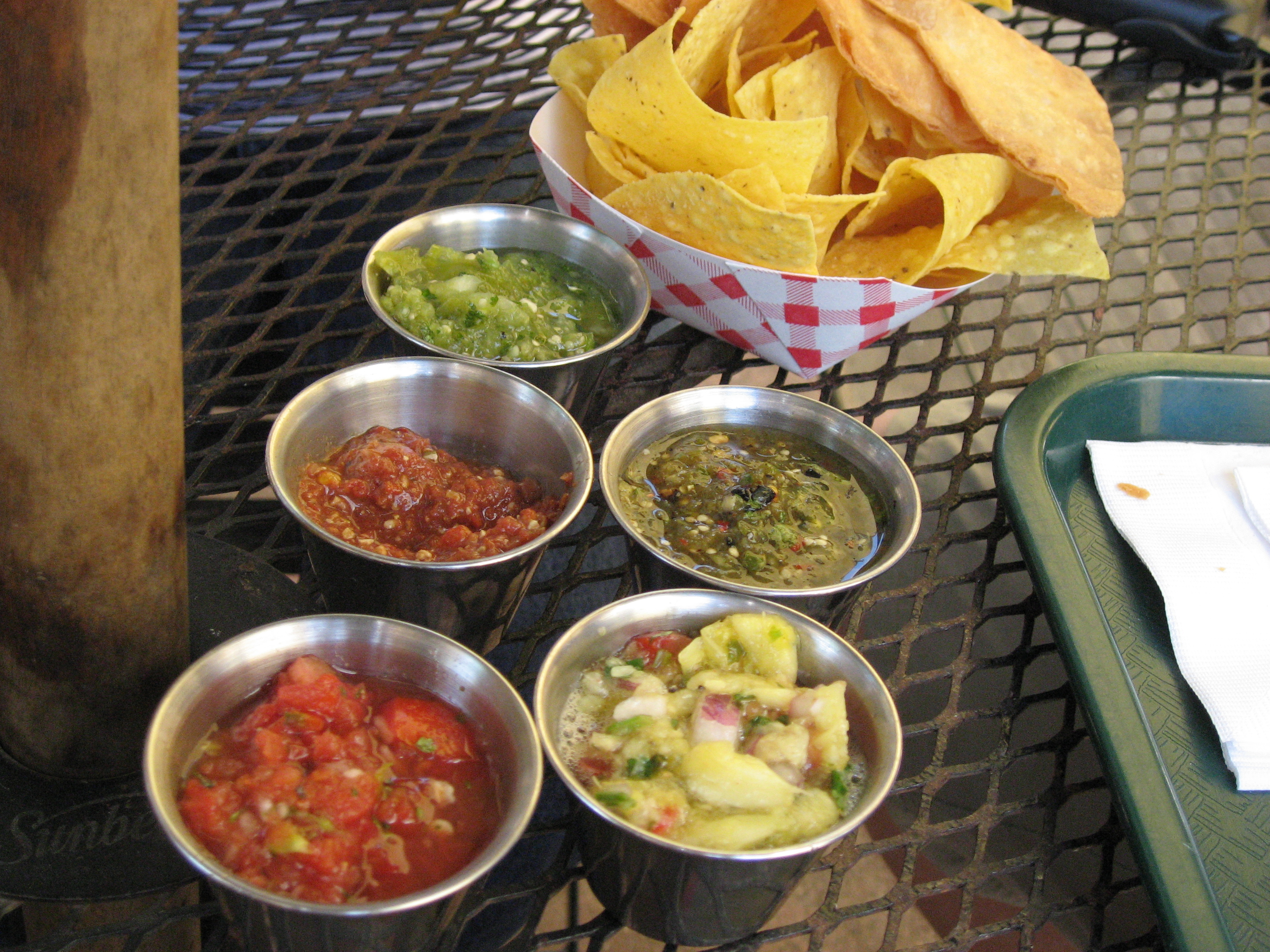 חמישה סוגי סלסה, מוגשים עם חטיפי צ'יפס. סוגי רוטב סלסה.